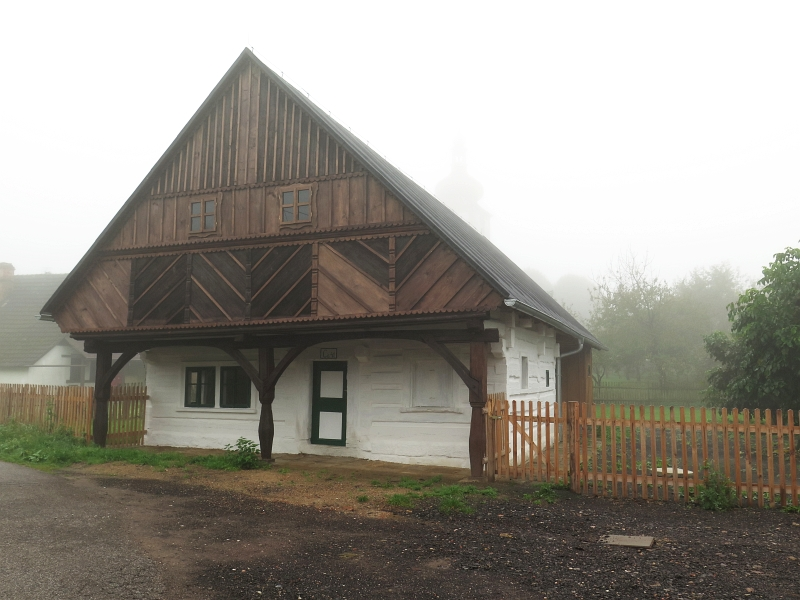 Dům čp. 41, Radim 41, Radim (okres Jičín).